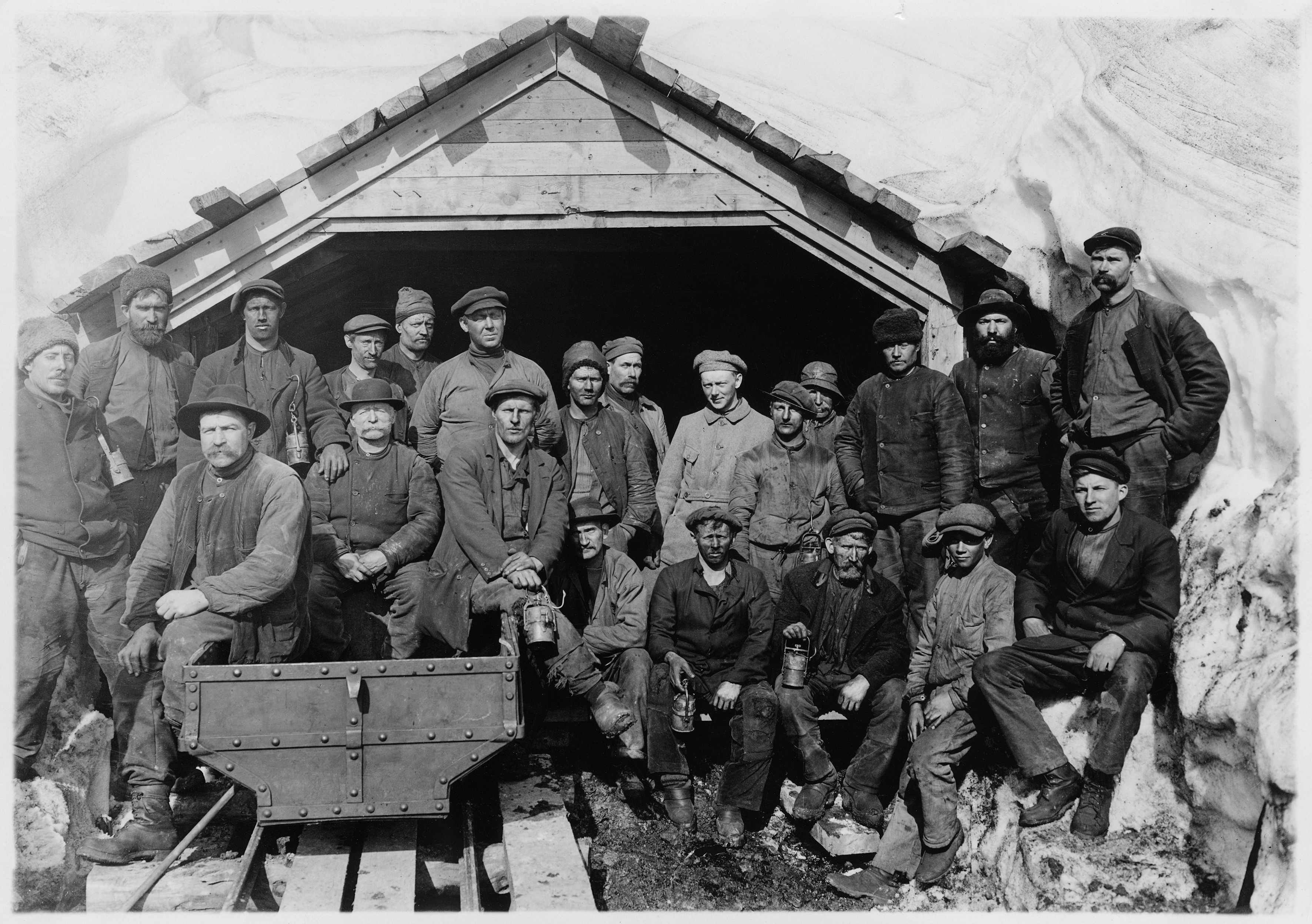 Sveagruvan på Spetsbergen. Gruvarbetare framför gruvmynningen, 1918.